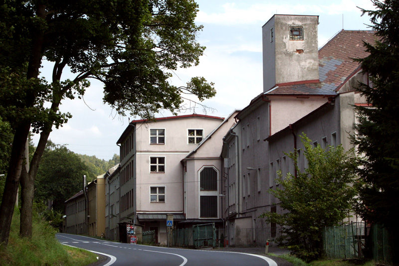 Porcelanka